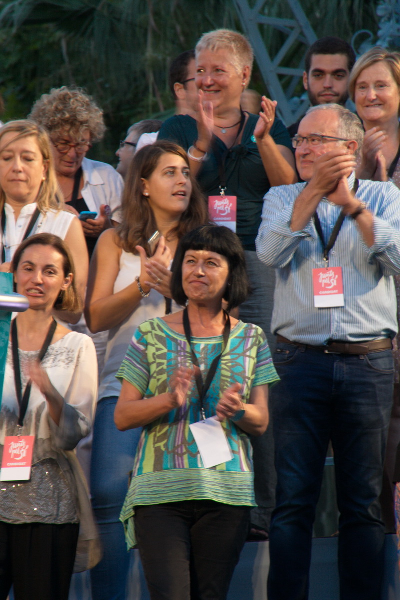 Montserrat Palau i Vergés (centre, primera fila) a l'acte de presentació de tots els candidats de la llista Junts pel Sí a Barcelona, al Psg.Lluís Companys.